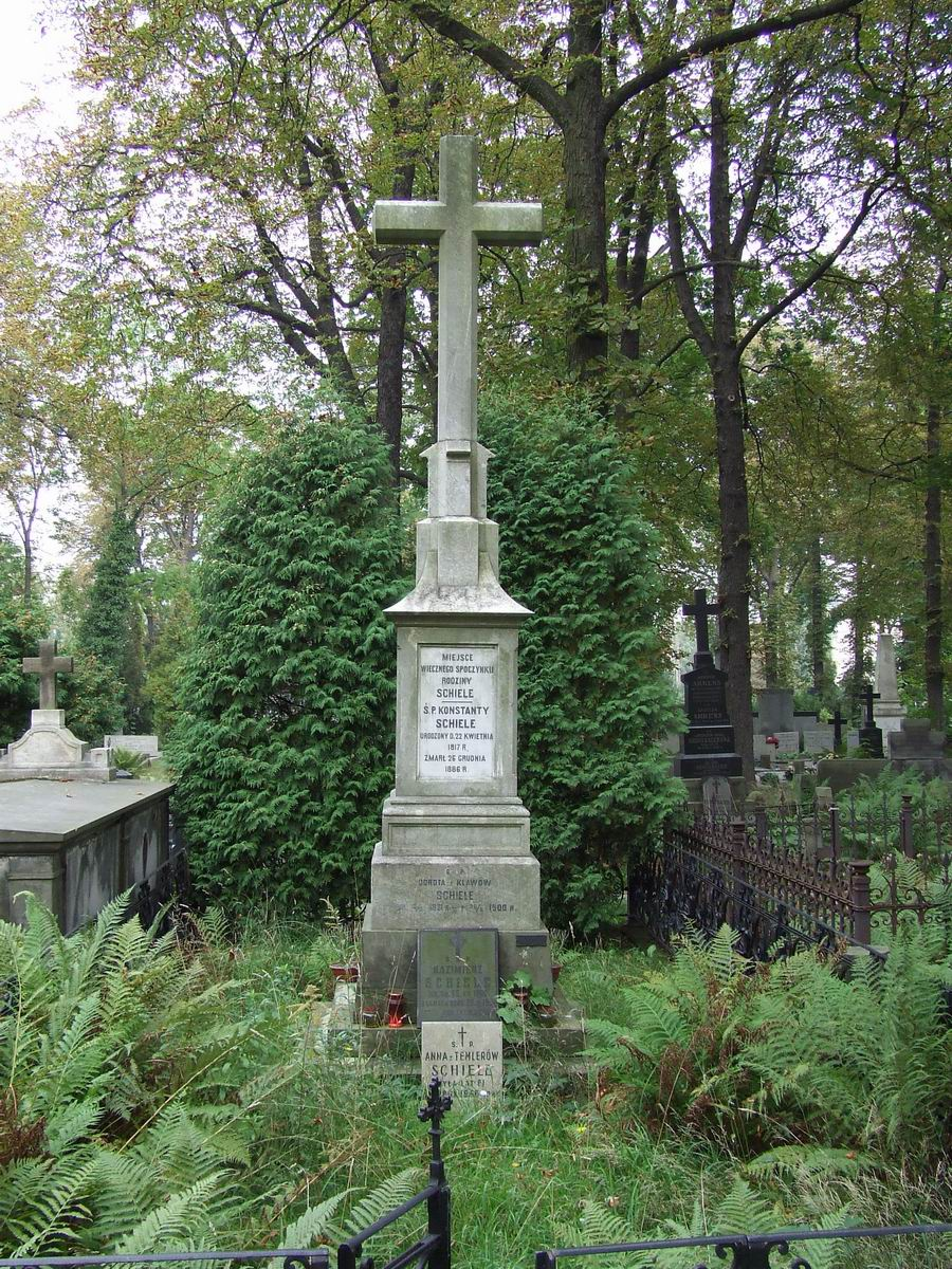 Konstanty Schiele, grób, Cmentarz Ewangelicko-Augsburski w Warszawie